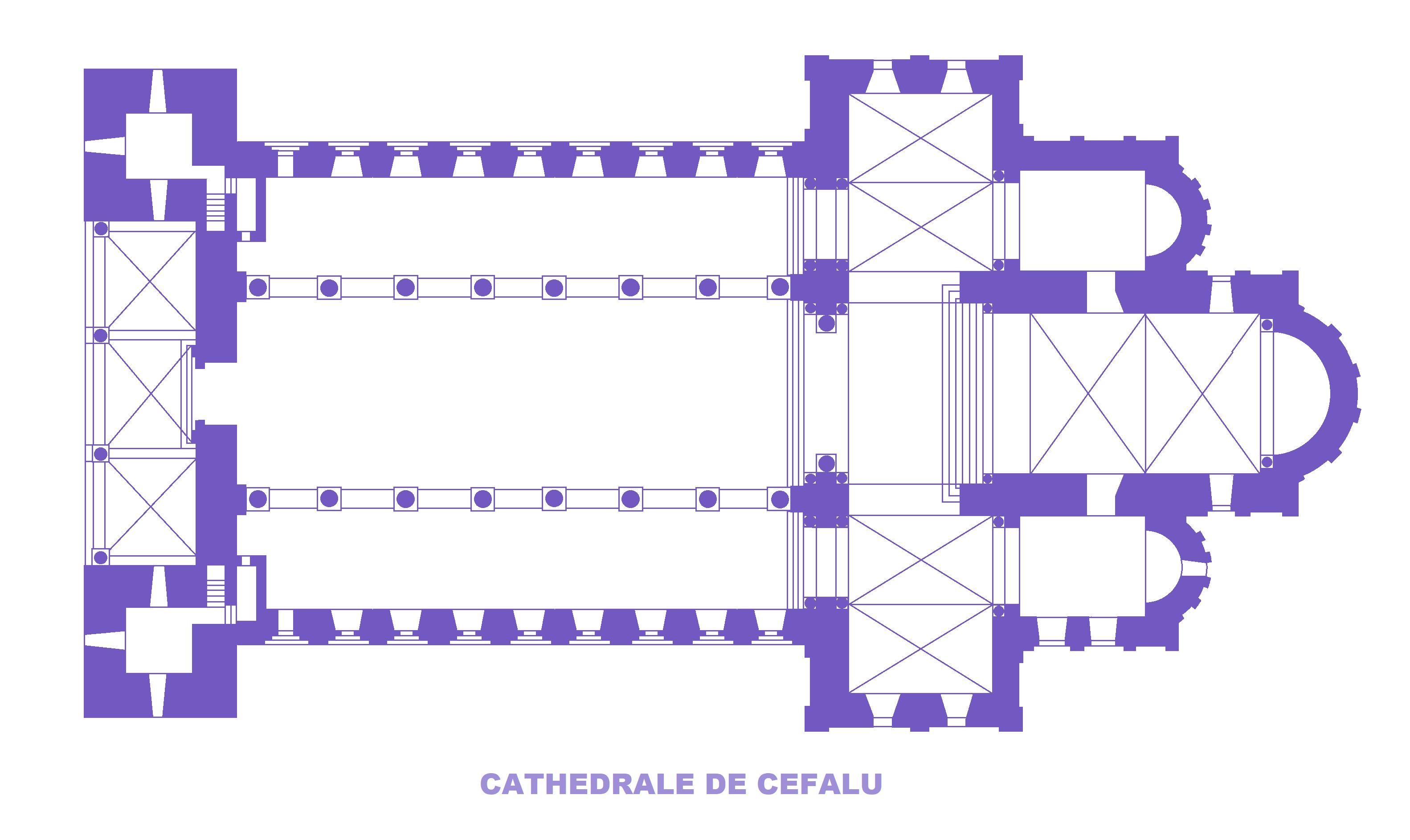 Cathédrale de Cefalu